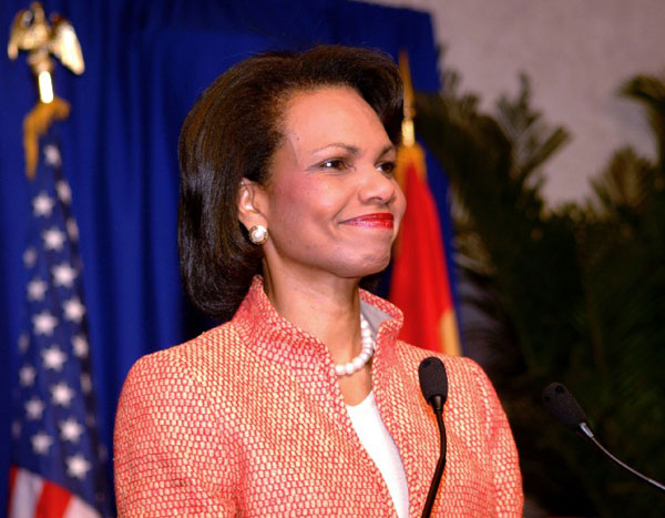 US State Dept Website.